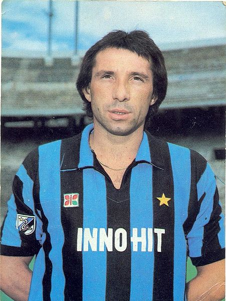 allenatore di calcio e calciatore italiano